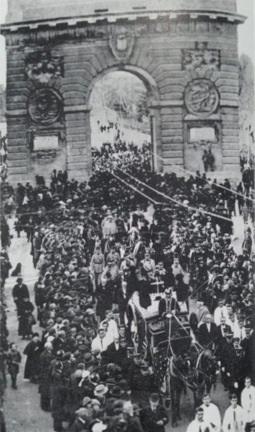 Cortège funéraire du Cardinal de Cabrières passant sous l'Arc de Triomphe du Peyrou à Montpellier.